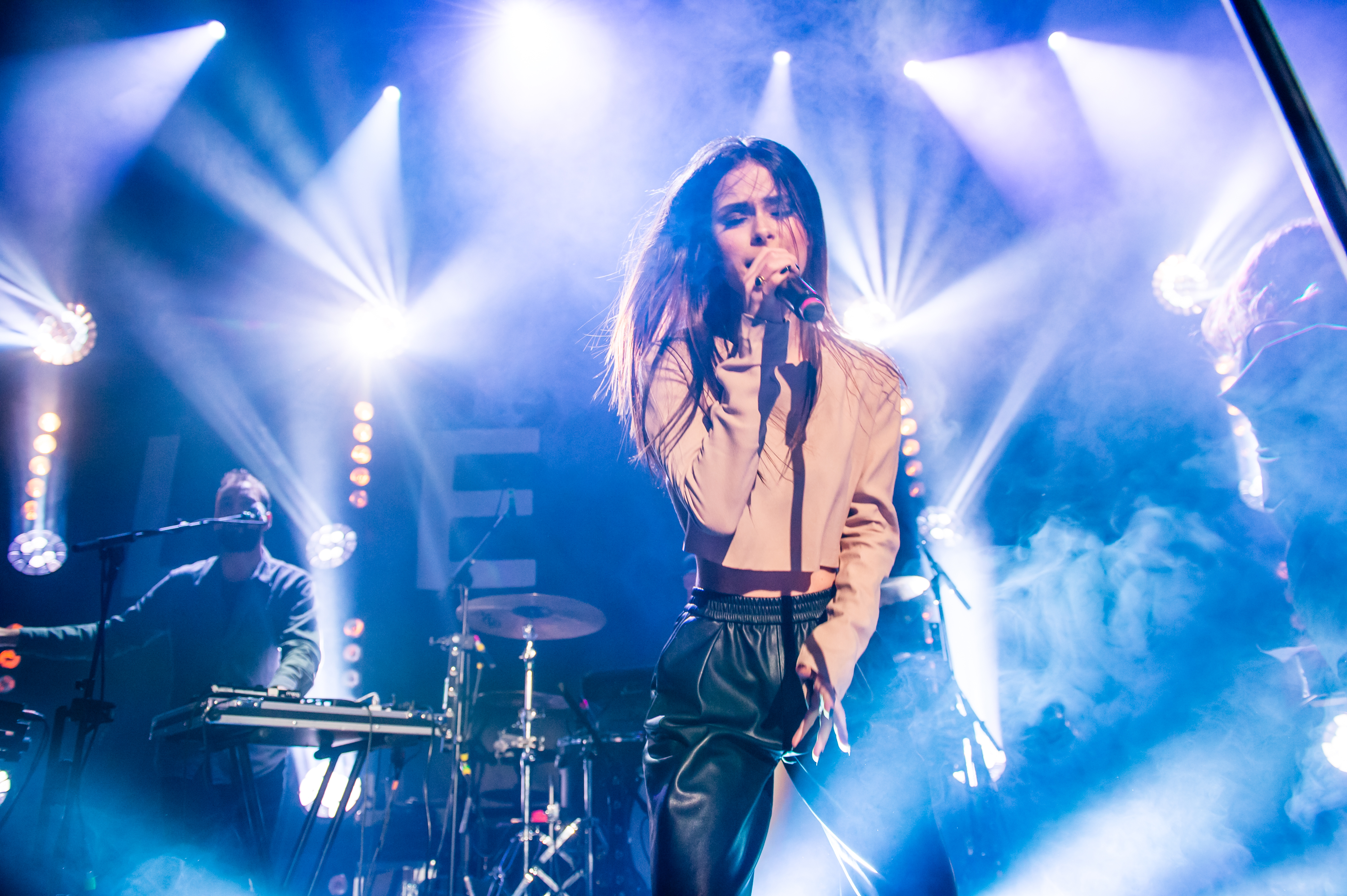 'Lena Meyer-Landrut Carry you Home Tour 2015 Köln'